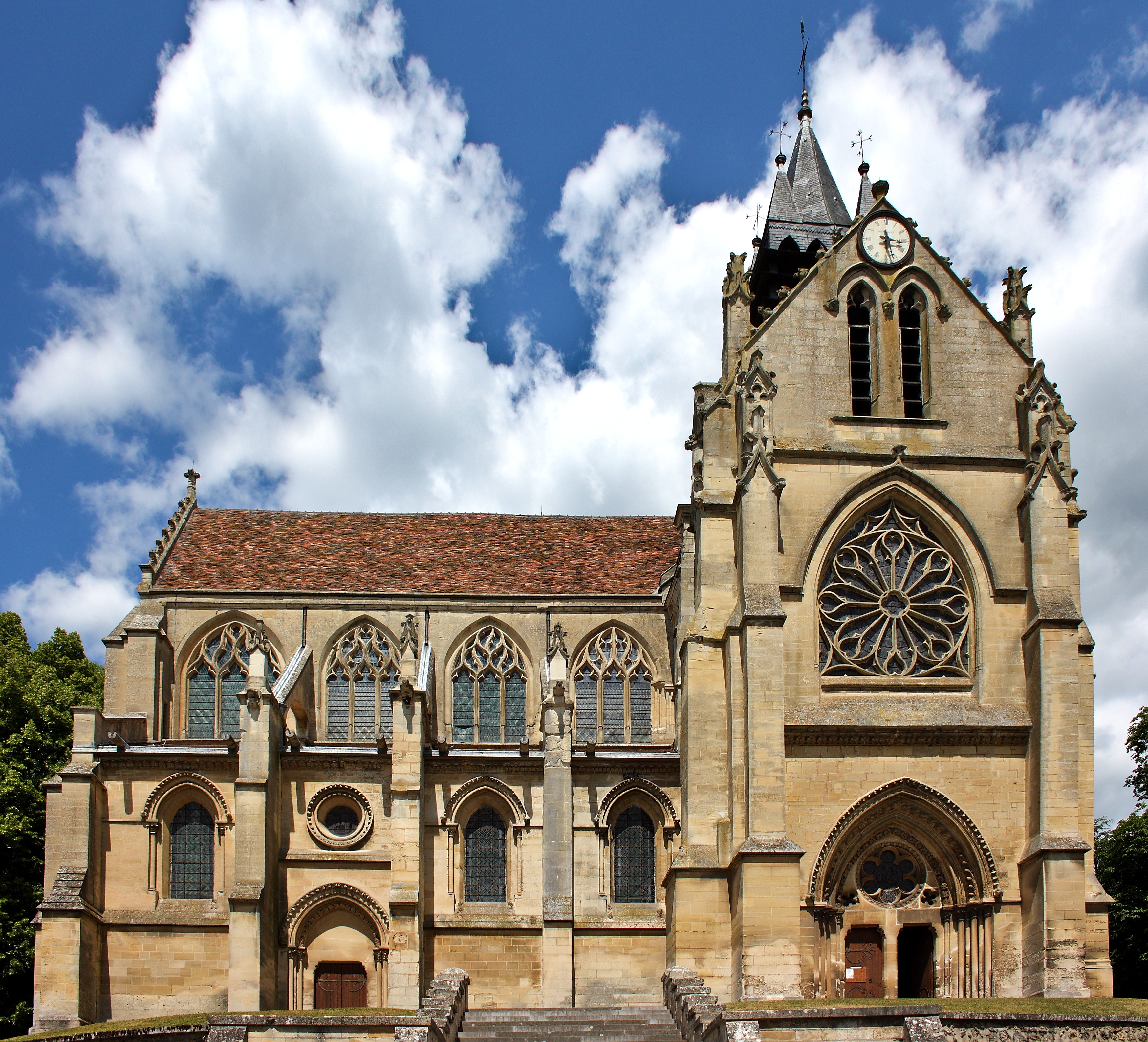 Katholische Kirche Notre-Dame in Taverny, einer Gemeinde im Département Val-d'Oise (Île-de-France), Ansicht von Süden